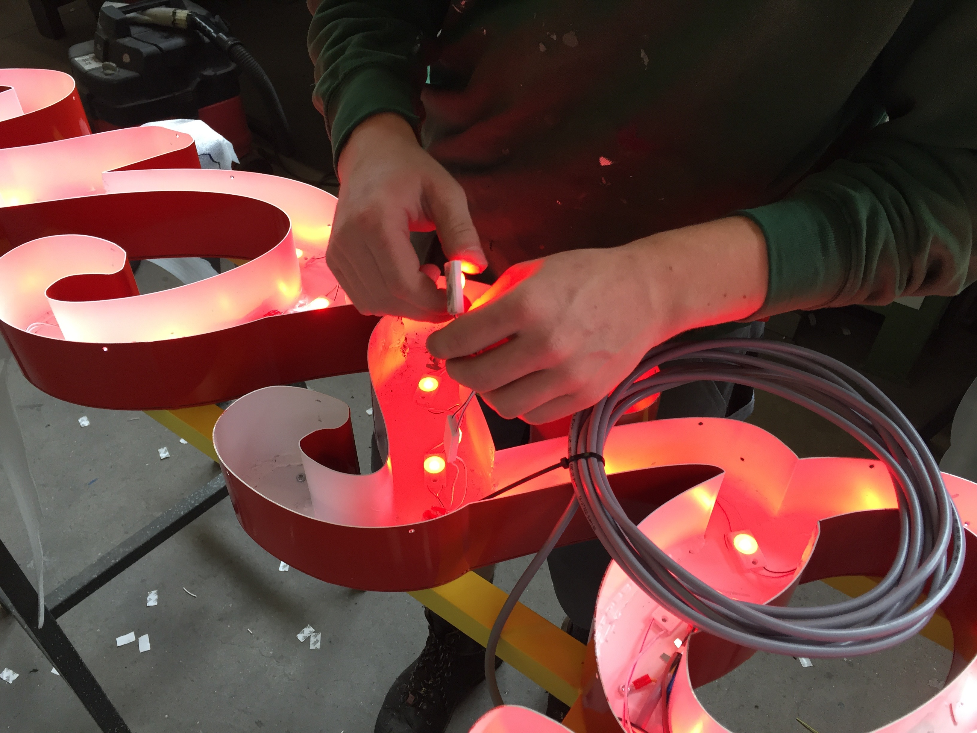 Damit die Einzelbuchstaben später auch leuchten, werden LED-Module im Buchstaben installiert.